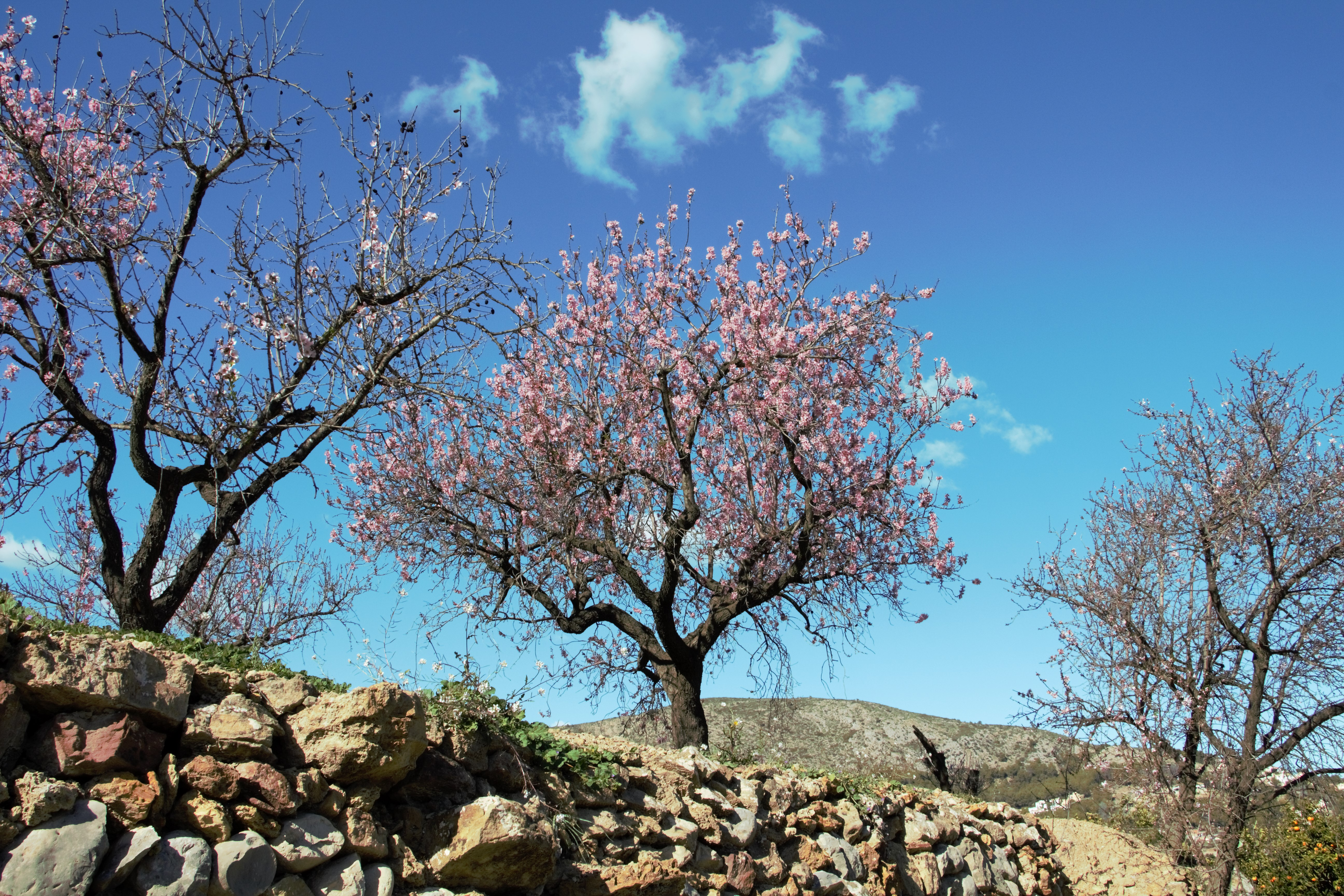 Almendros en floración en febrero de 2019, Alcalalí, Alicante, España.